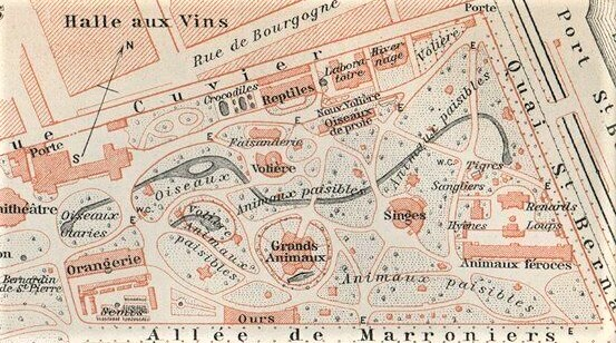 Détail du plan du Jardin des plantes de Paris paru en 1910 dans "Paris and environs with routes from London to Paris" (Karl Baedeker, London: 17th Edition), montrant la Ménagerie du Jardin des plantes de Paris